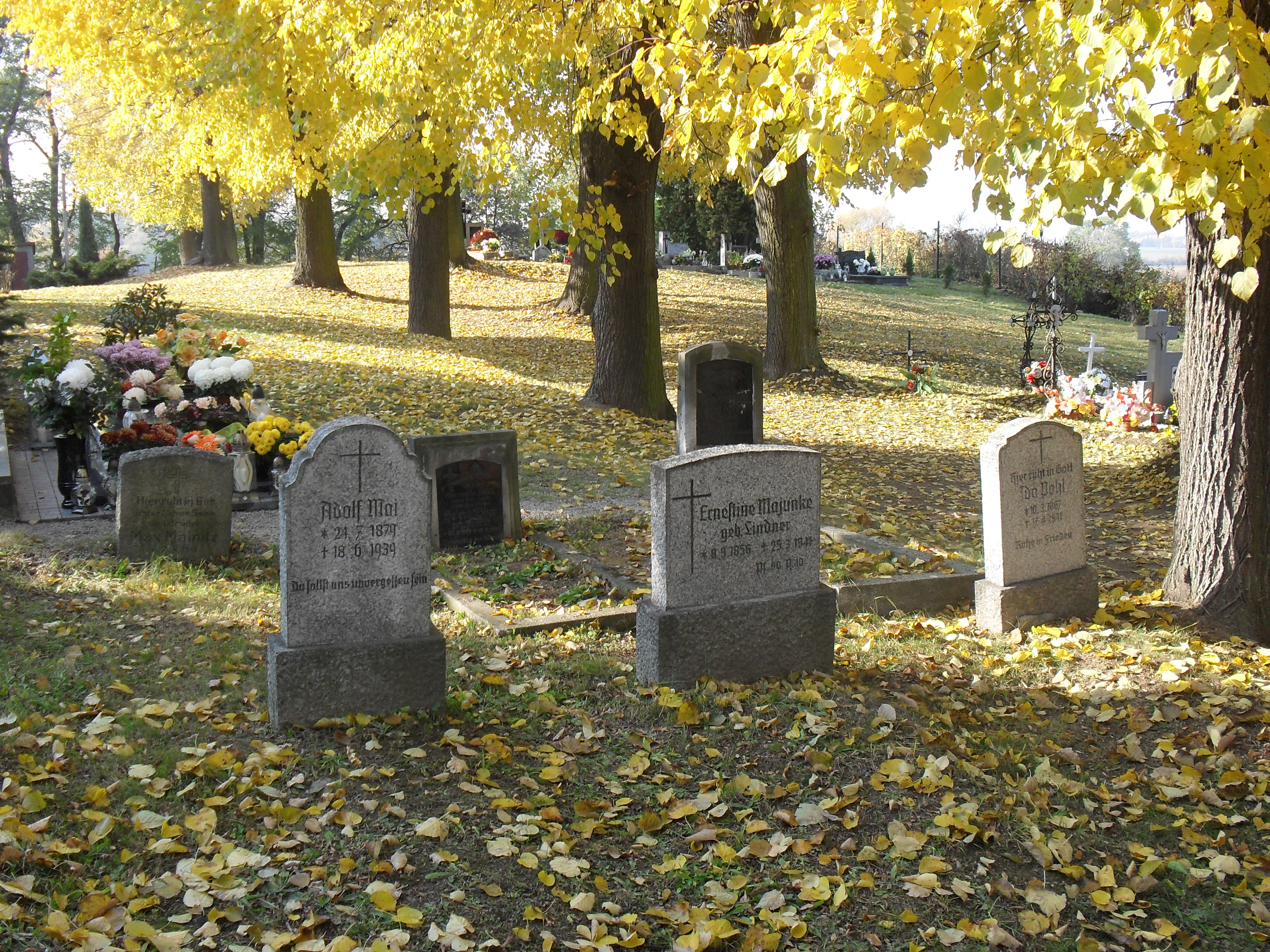 Pasieczna, stara część cmentarza parafialnego